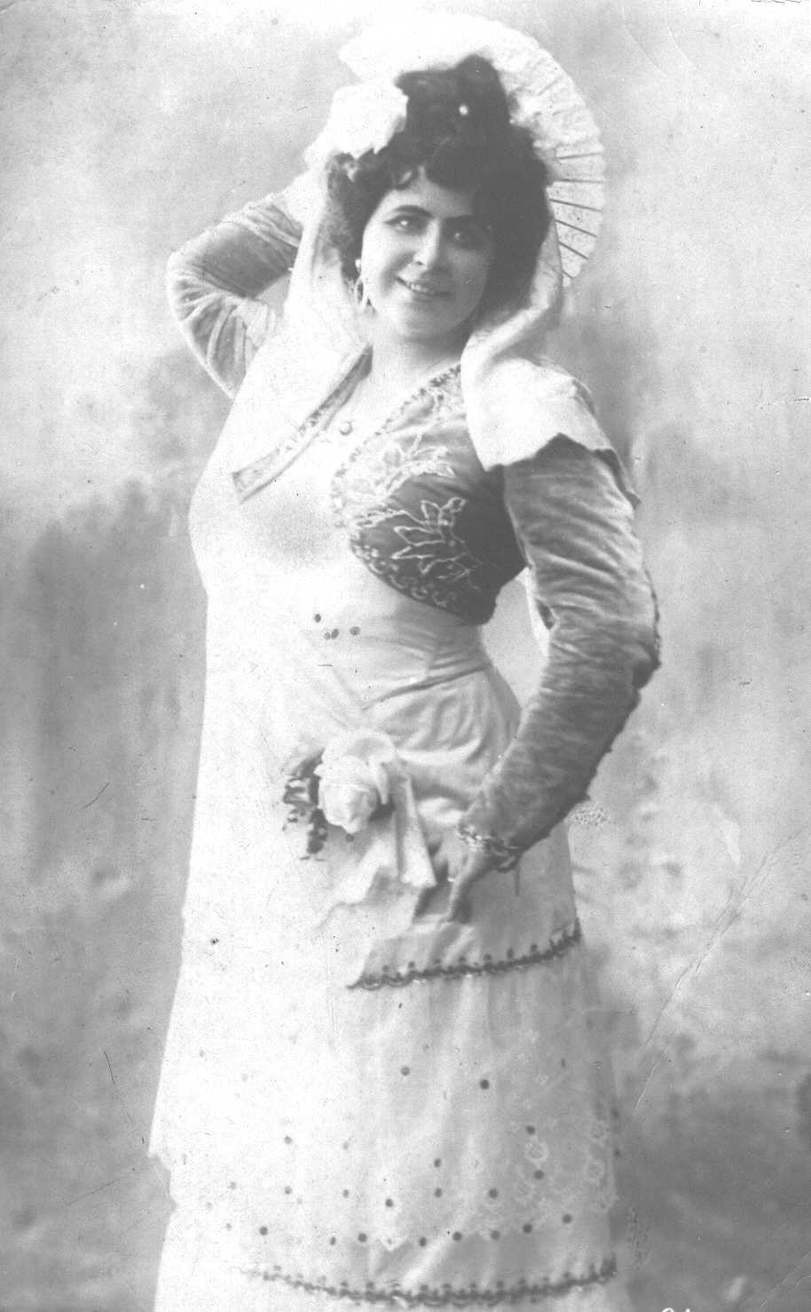 М. М. Скибицкая в роли Кармен